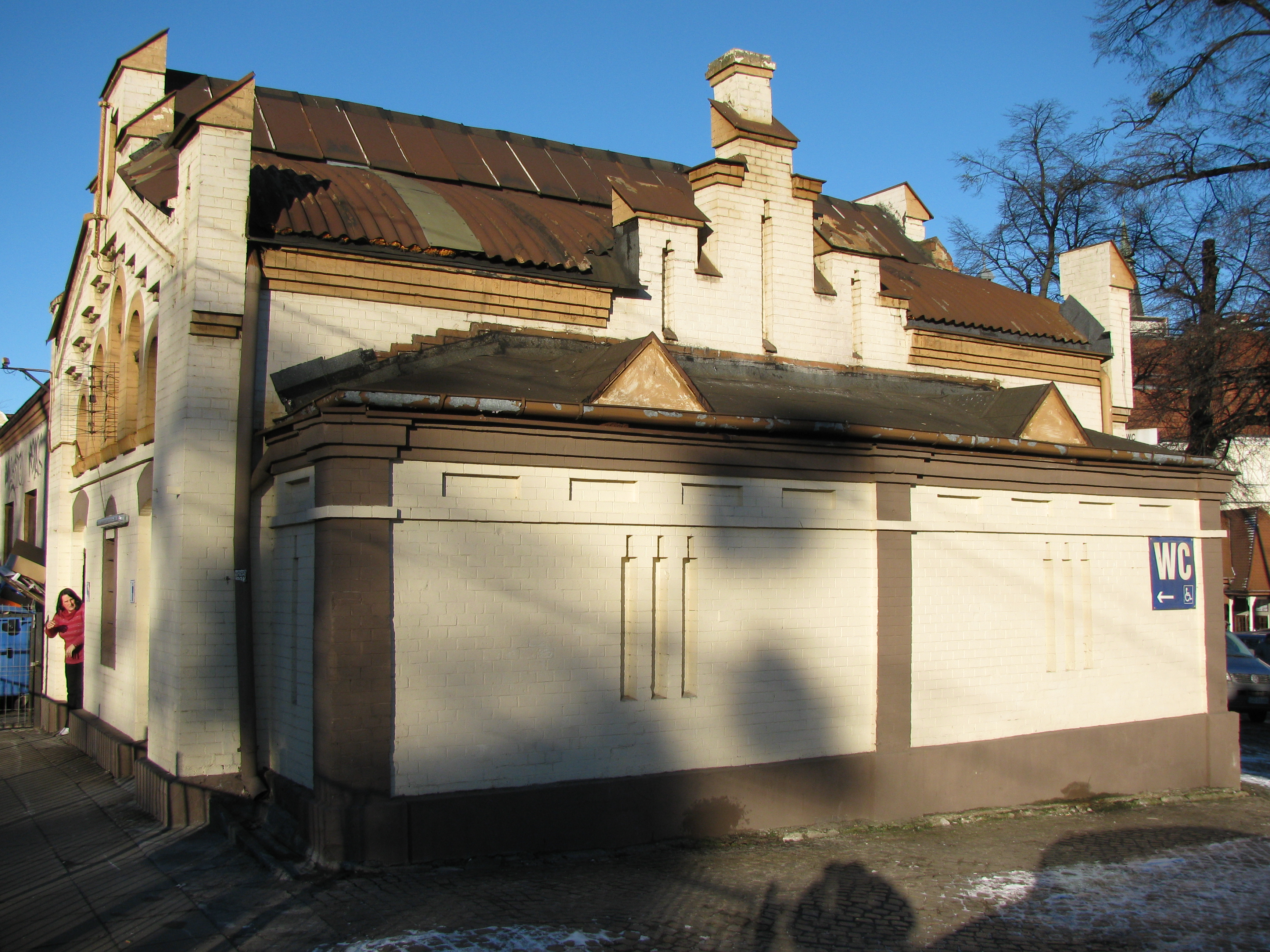 Sopot - neogotycki szalet z ok. 1870 r. przy dworcu kolejowym, najstarsze zabudowania dworca.